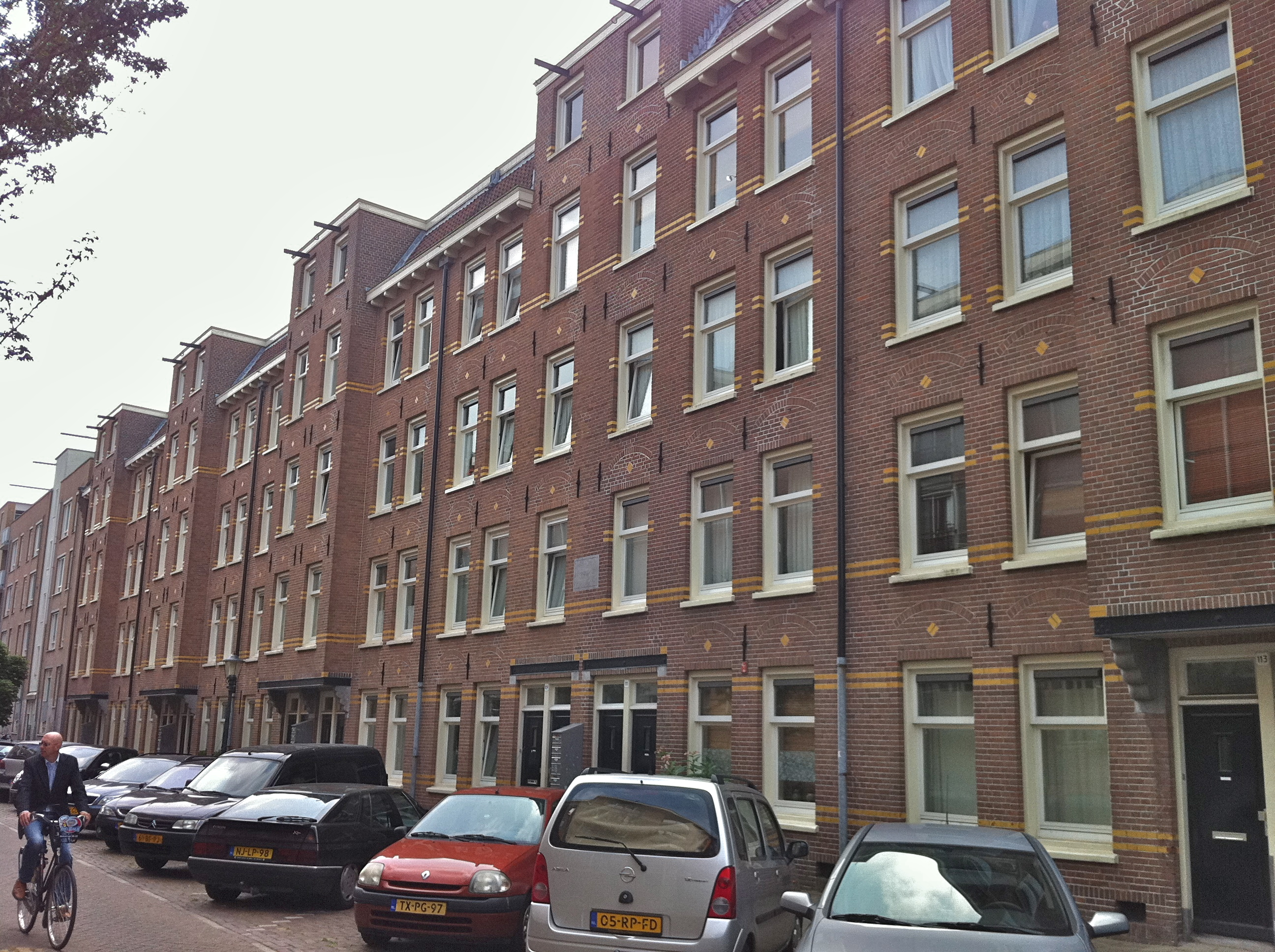 Amsterdam - Beuningenstraat Rochdale. Rijksmonument, eerste woningwetwoningen Amsterdam